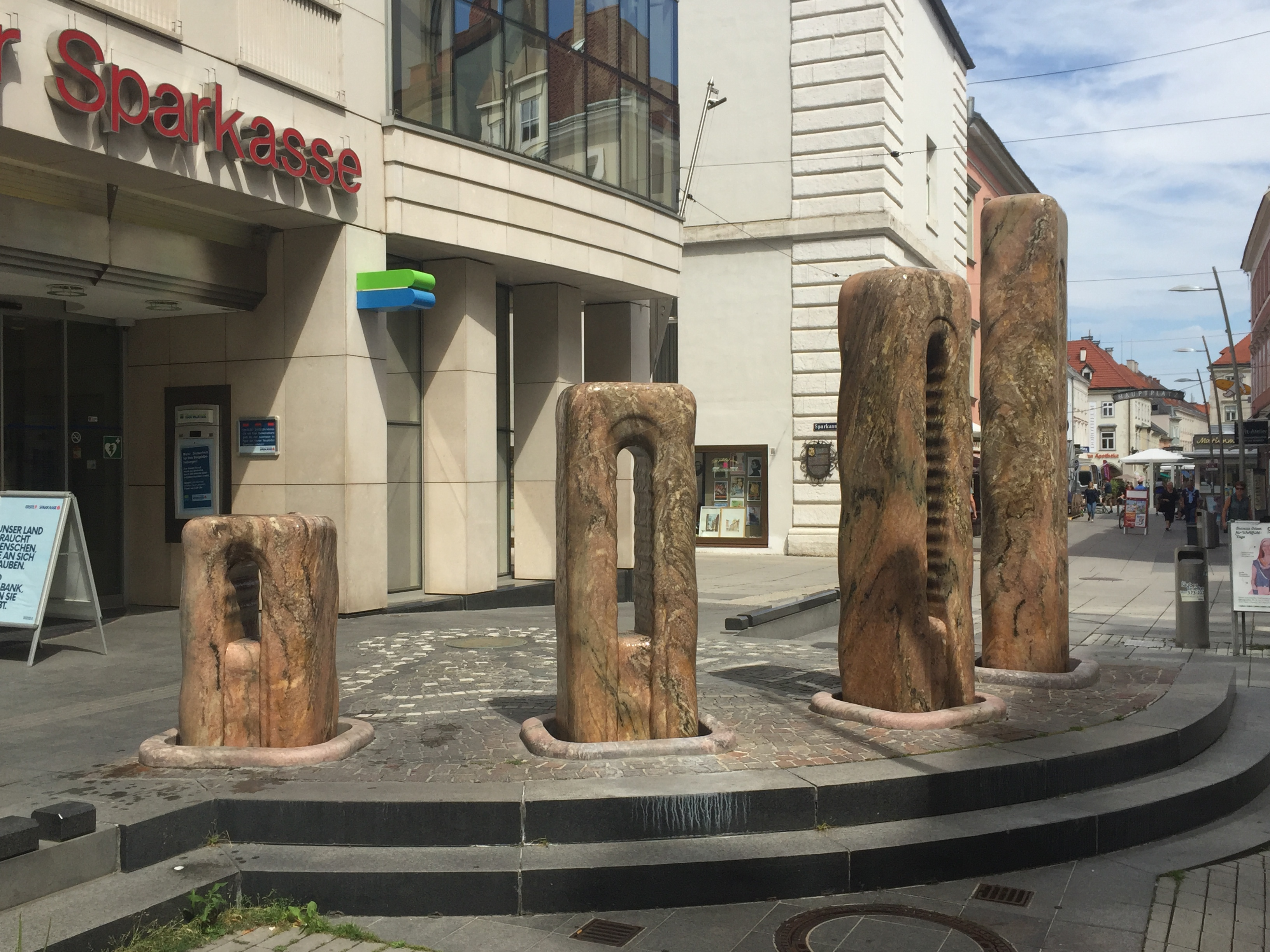 Sparkassenbrunnen: Gestaltung durch Prof. Hans Muhr, errichtet im Jahr 1993 anlässlich der Neugestaltung des Kundenzentrums von der Wiener Neustädter Sparkasse in der Neunkirchner Straße 4, 1995 der Stadt Wiener Neustadt als Geschenk übergeben.